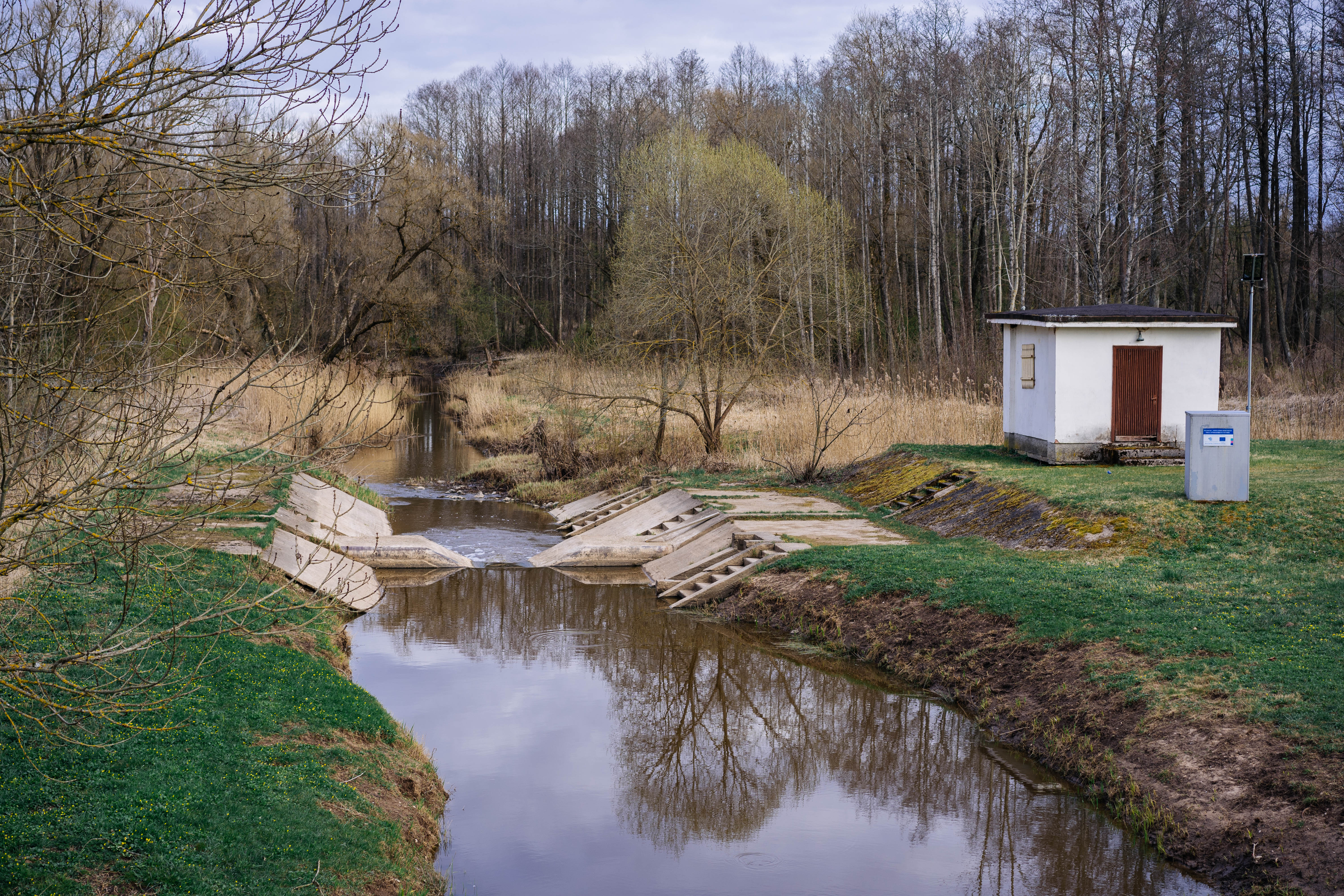 Svyla ties matavimo stotimi Guntauninkuose